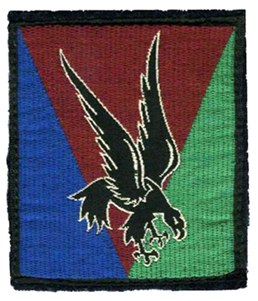 Insigne de bras en tissu de la 10e division parachutiste française